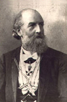 Otto Hieber (1840–1929), Logenmeister der Johannisloge "Zum Todtenkopf und Phönix" von 1885-1922